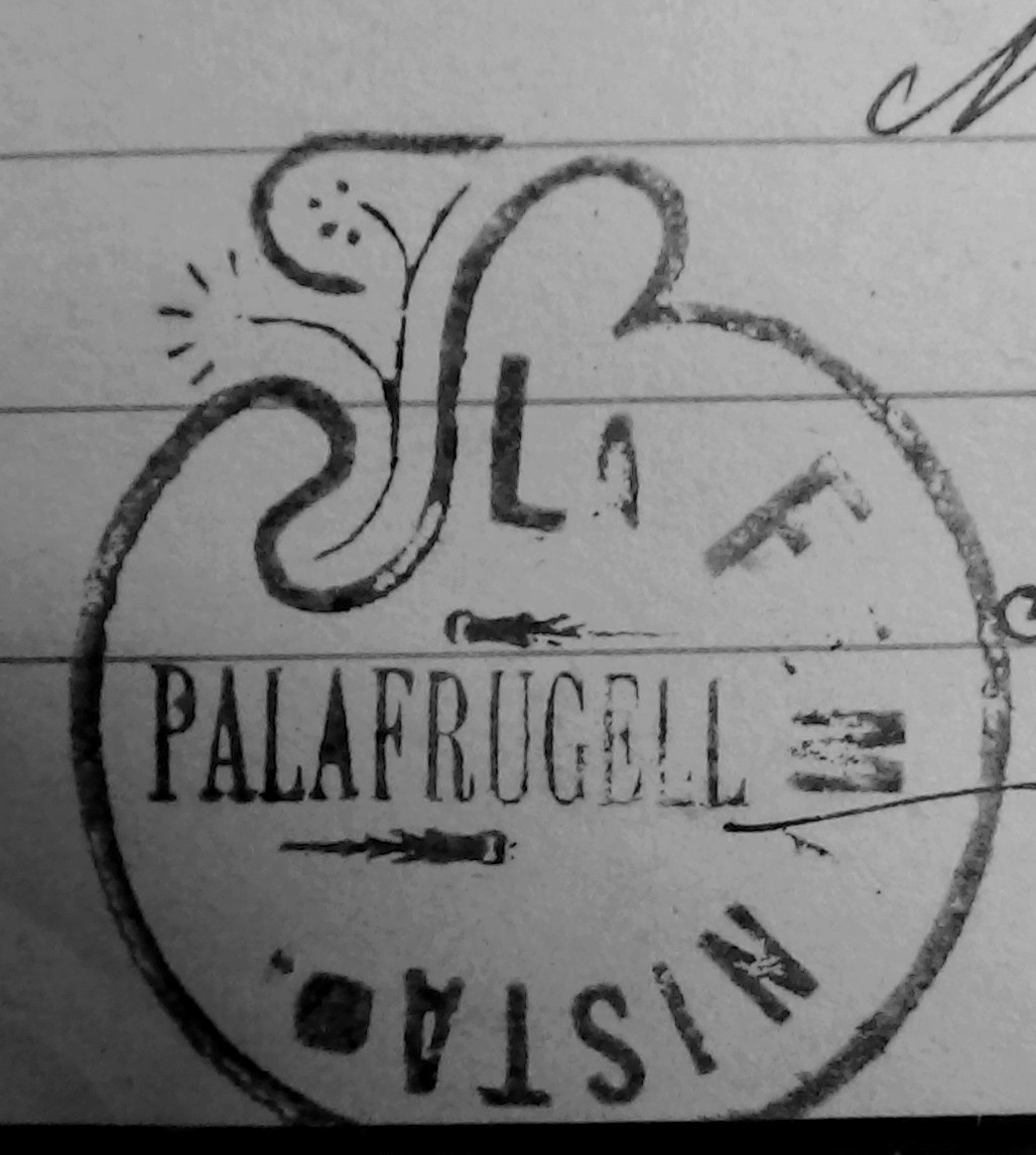 Fotografia del segell de La Feminista, original de l'Arxiu Municipal de Palafrugell. Fons La Previsió Obrera